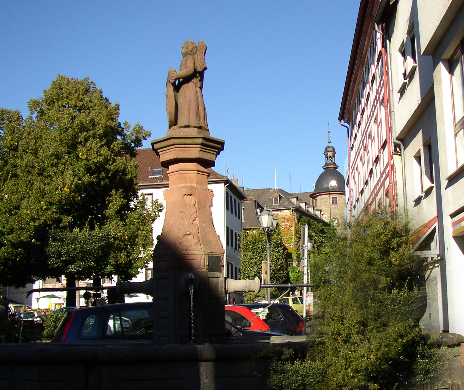 Solms-Schloß und Häuser der Innenstadt